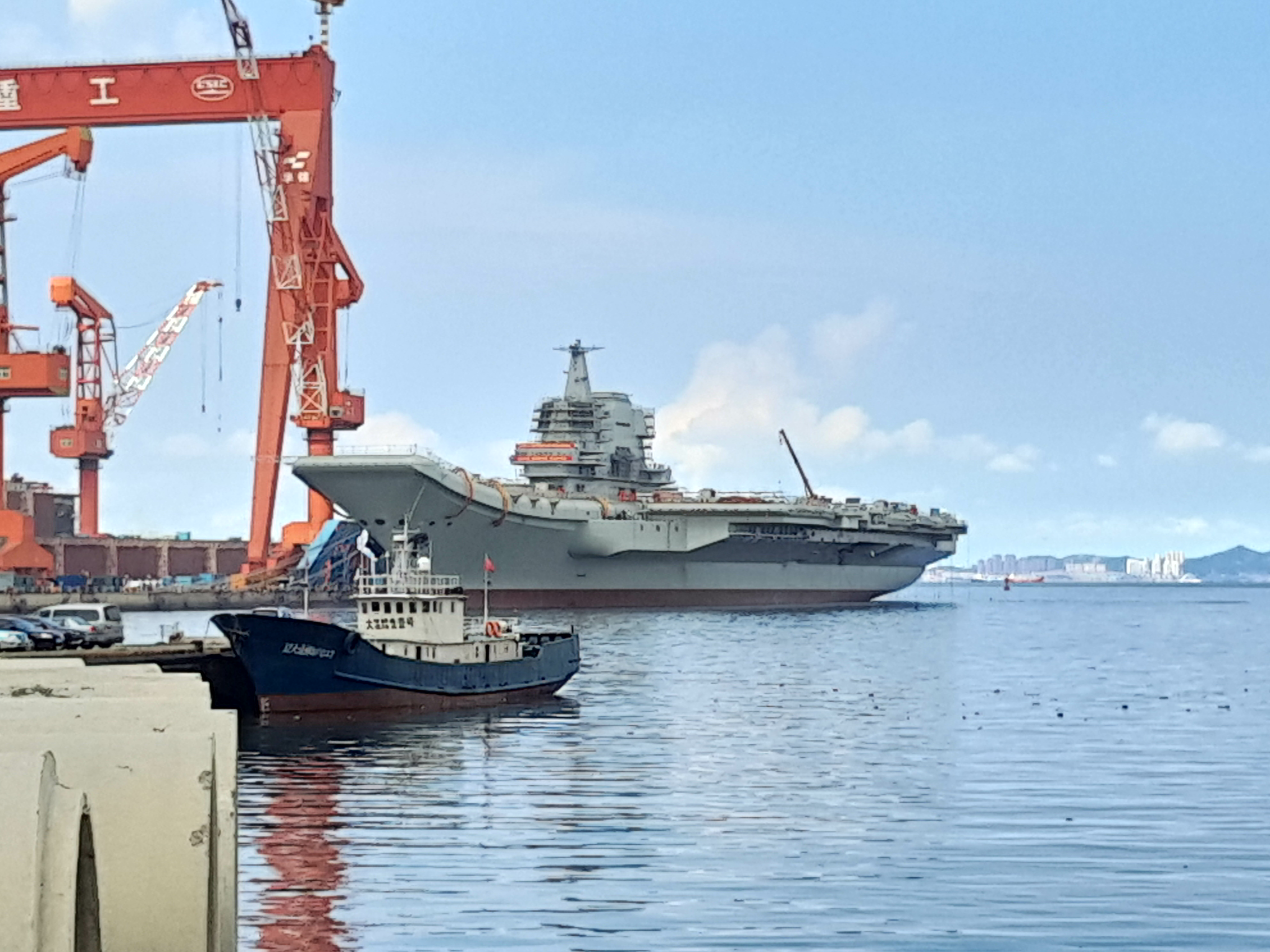 中文（中国大陆）: 正在栖装中的001A，拍摄于大连港